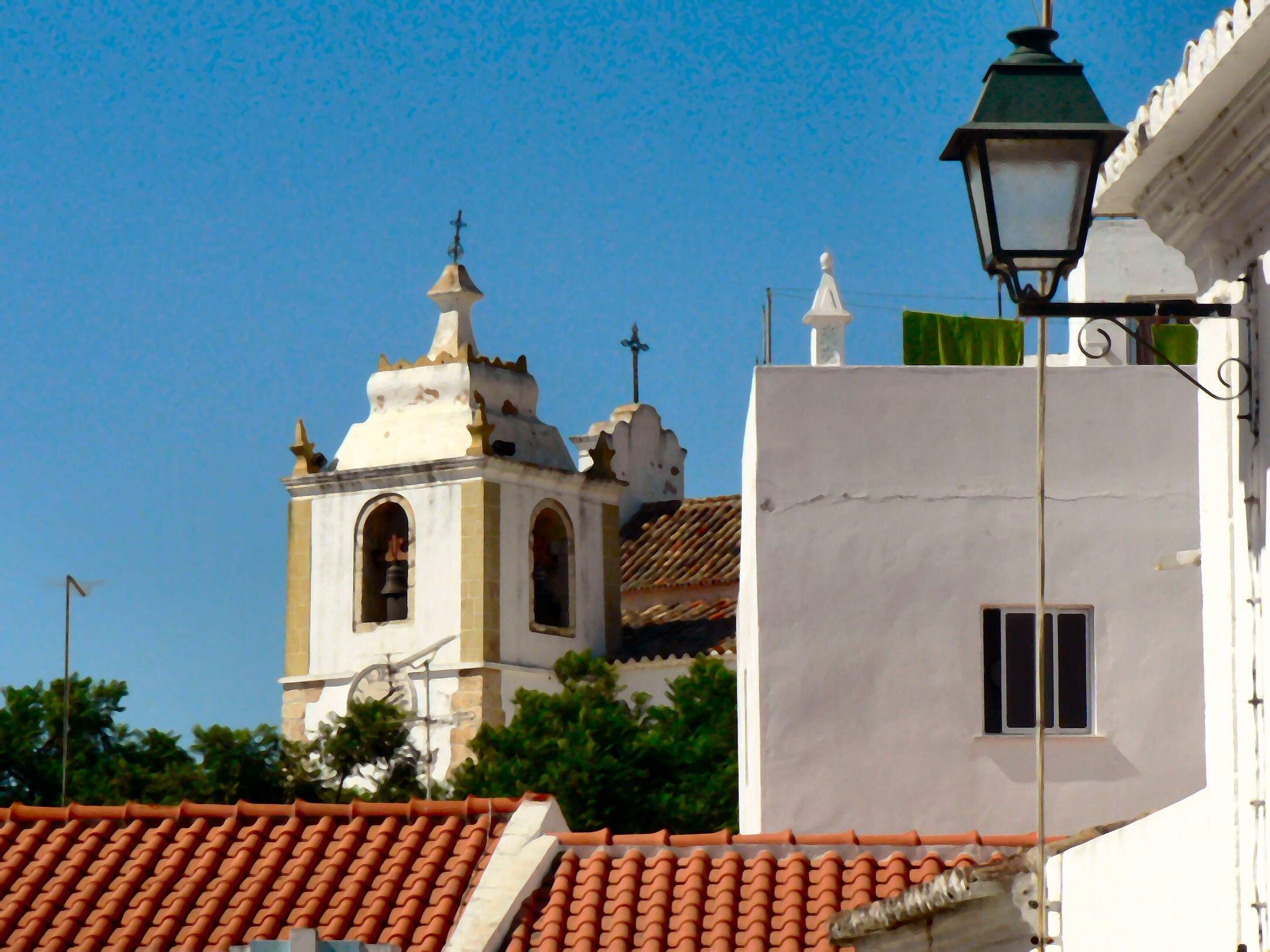 Torre da Igreja MAtriz de Alvor